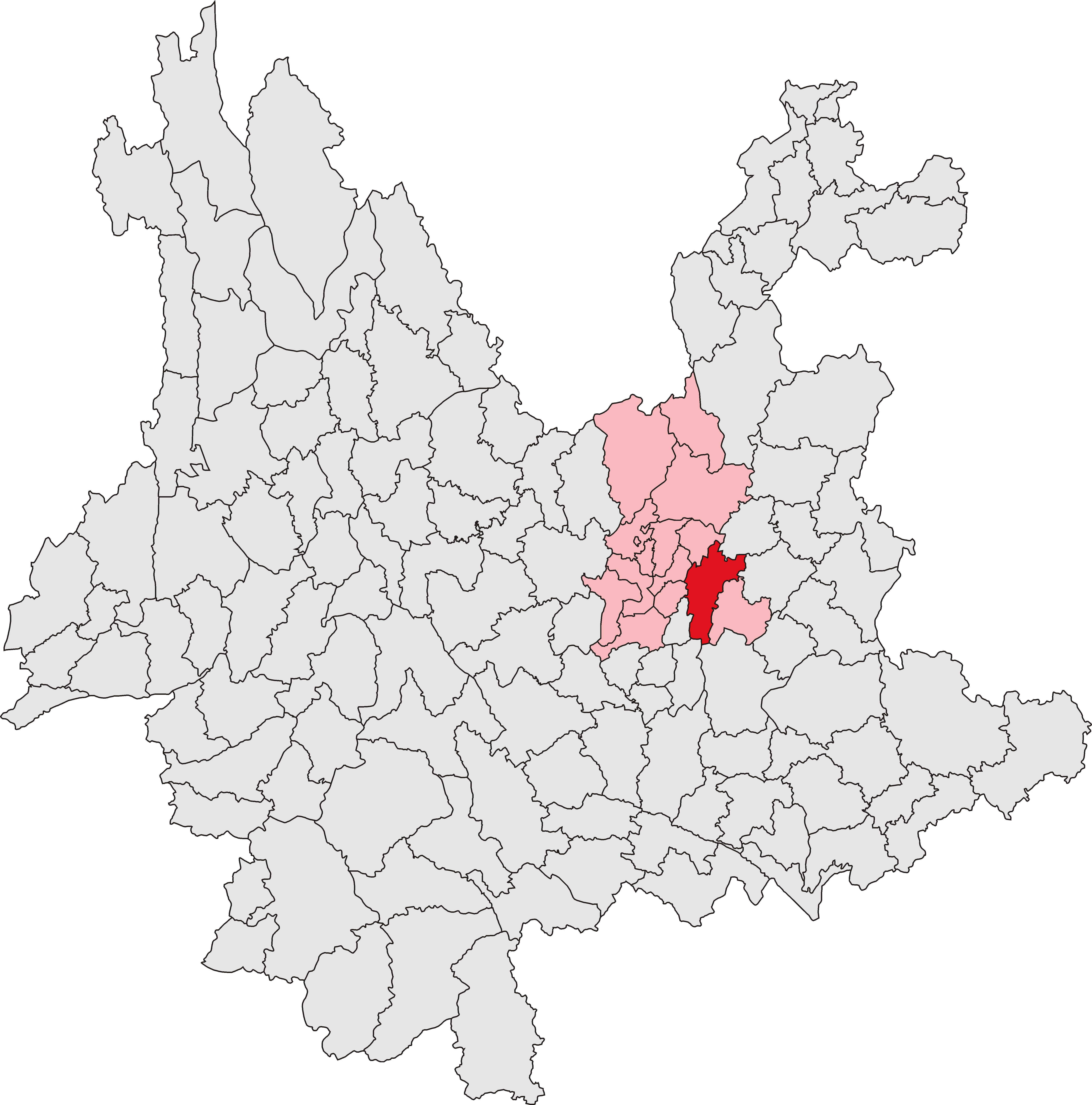 中文（中国大陆）: 宜良县位置图